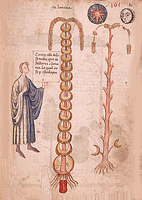 Manuscrite de Jean de Roquetaillade 1350